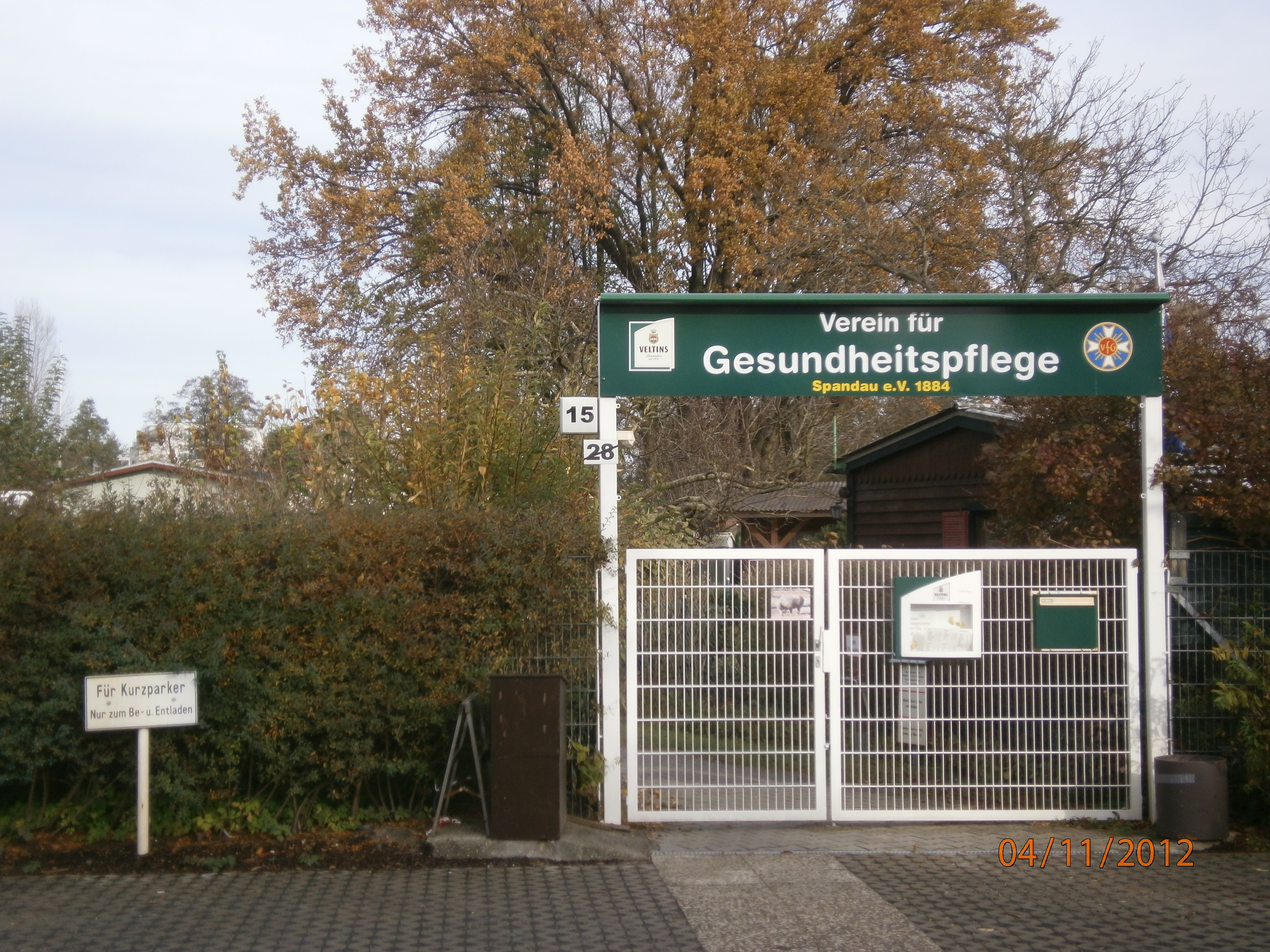 VereinGesundheitspflege ist eine Kolonie im Berliner Ortsteil Hakenfelde.